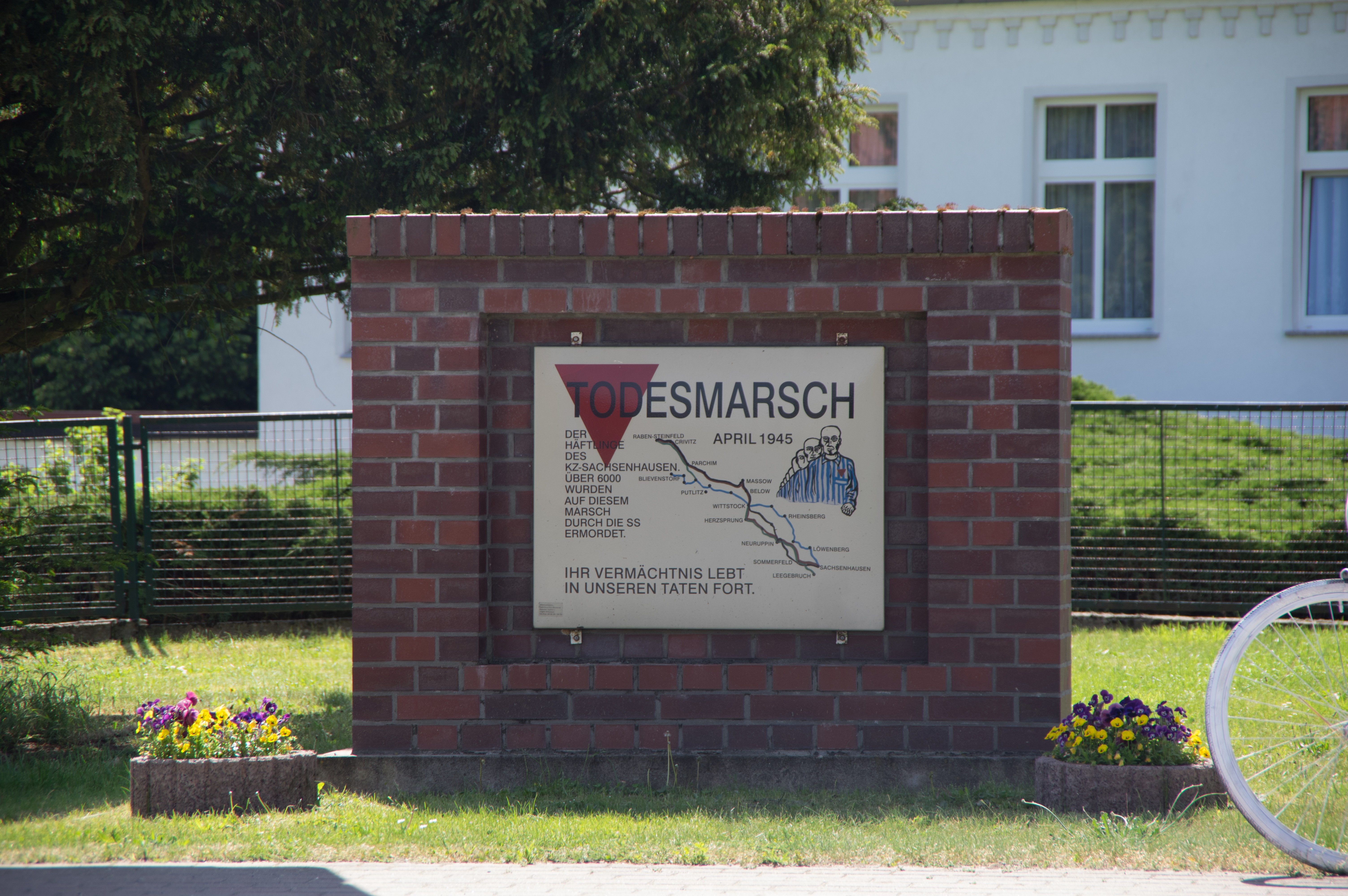 Heiligengrab, Ortsteil Herzsprung in Brandenburg. Der Gedenkstein erinnert an den Todesmarsch 1945.